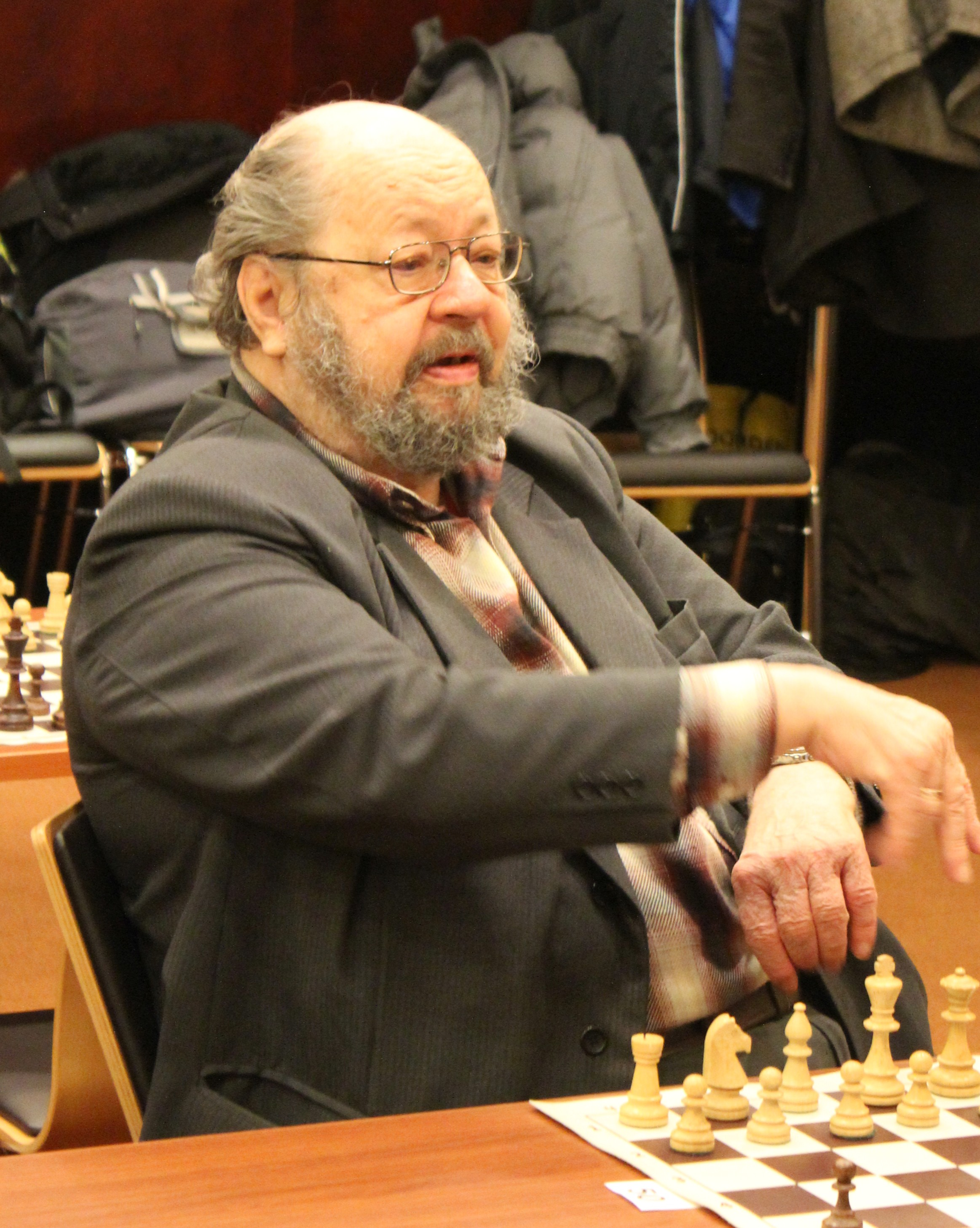 Hillar Kärner maleturniiril "Meenutades Paul Kerest", Tallinn, 2013